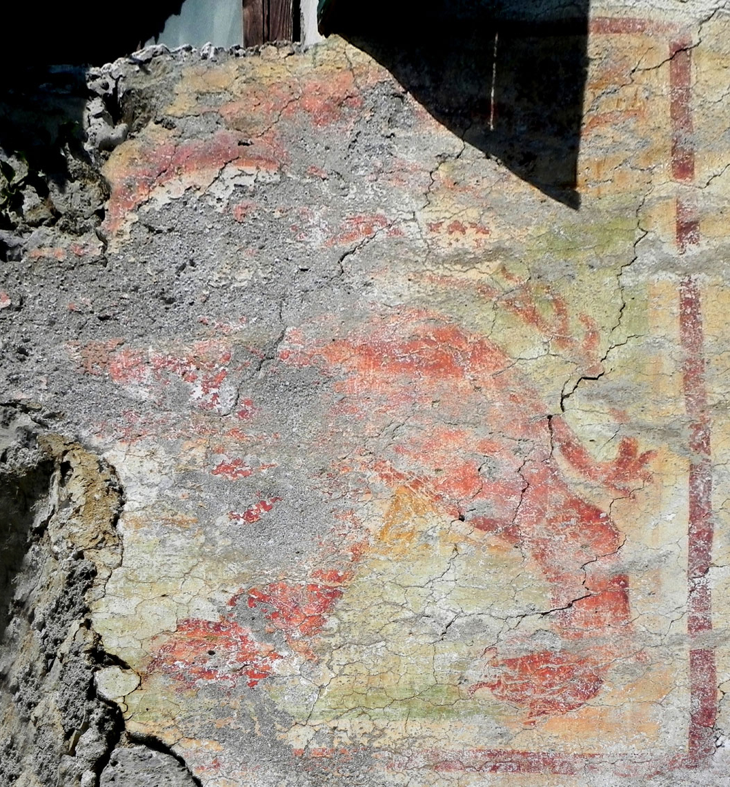 Affresco del XVIsecolo "Leone di San Marco" - Gorno (Italy) contrada di San Giovanni